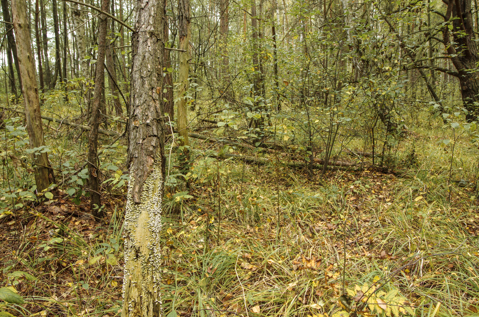 Přírodní rezervace Děvín, okres Cheb